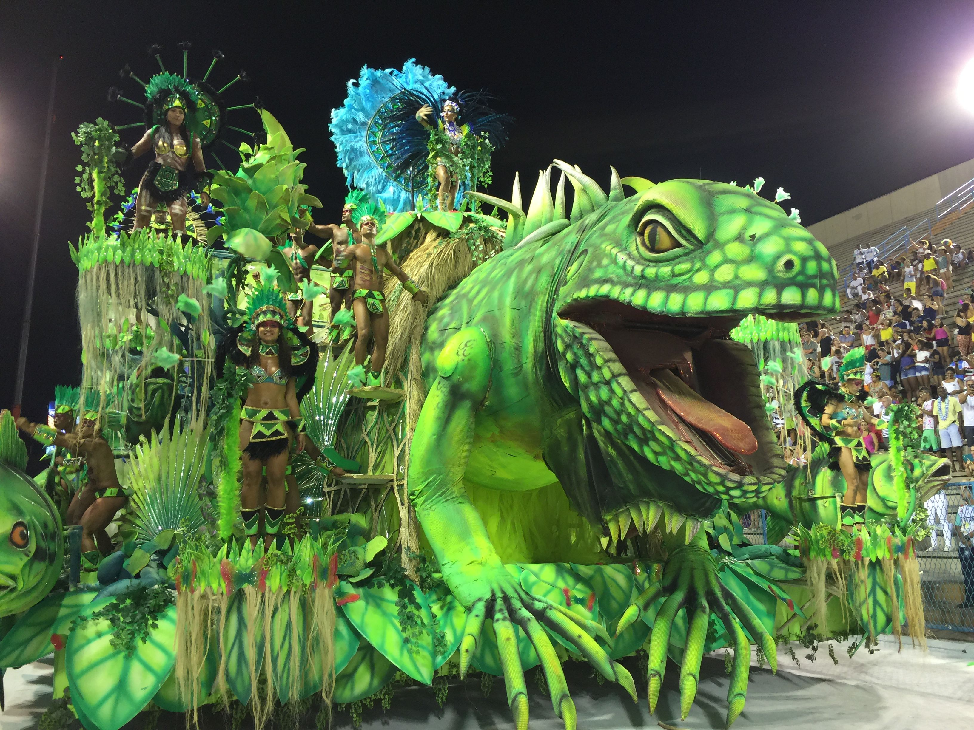 Rio de Janeiro - Desfile da Acadêmicos da Rocinha durante o desfile da Série A na Marquês de Sapucaí (Cristina Índio do Brasil/Agência Brasil)